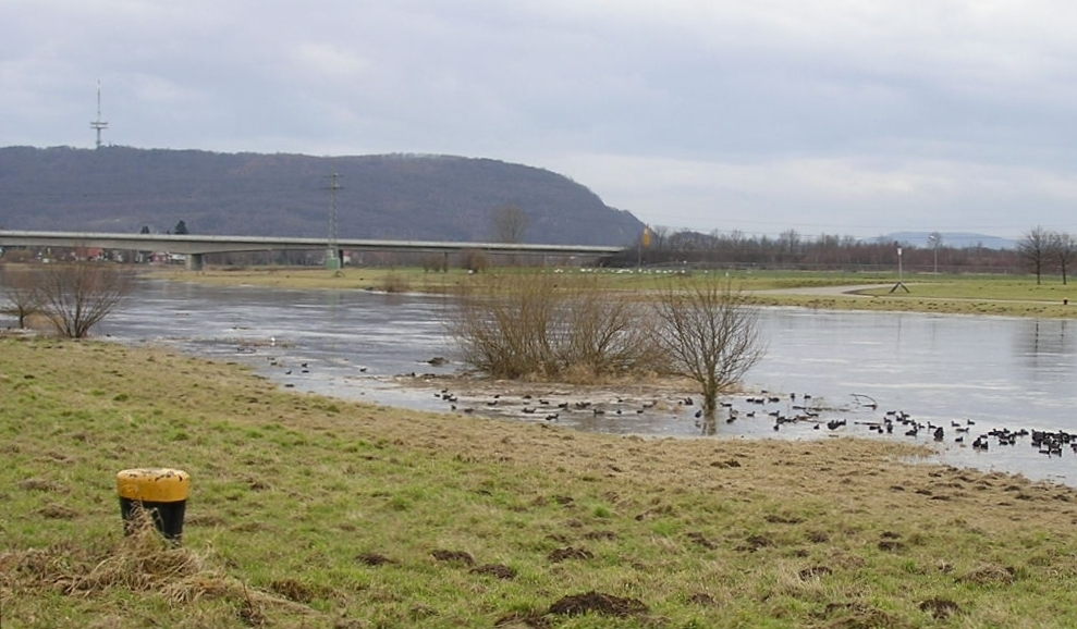 Der Jakobsberg (Porta Westfalica) von Norden aus gesehen